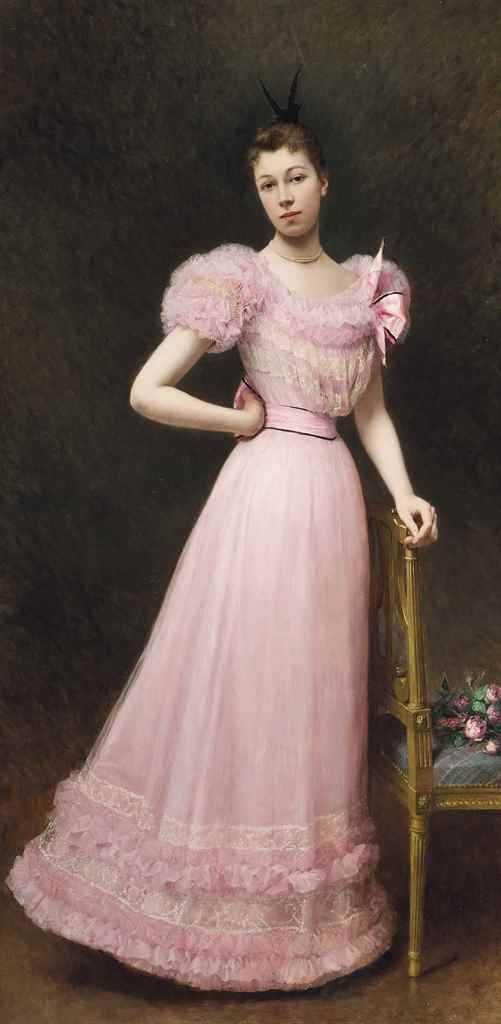 Portrait de femme par Alexandre-Jacques Chantron (1842-1918) dit "La robe rose" ou "Avant le bal", 198.5 x 99 cm